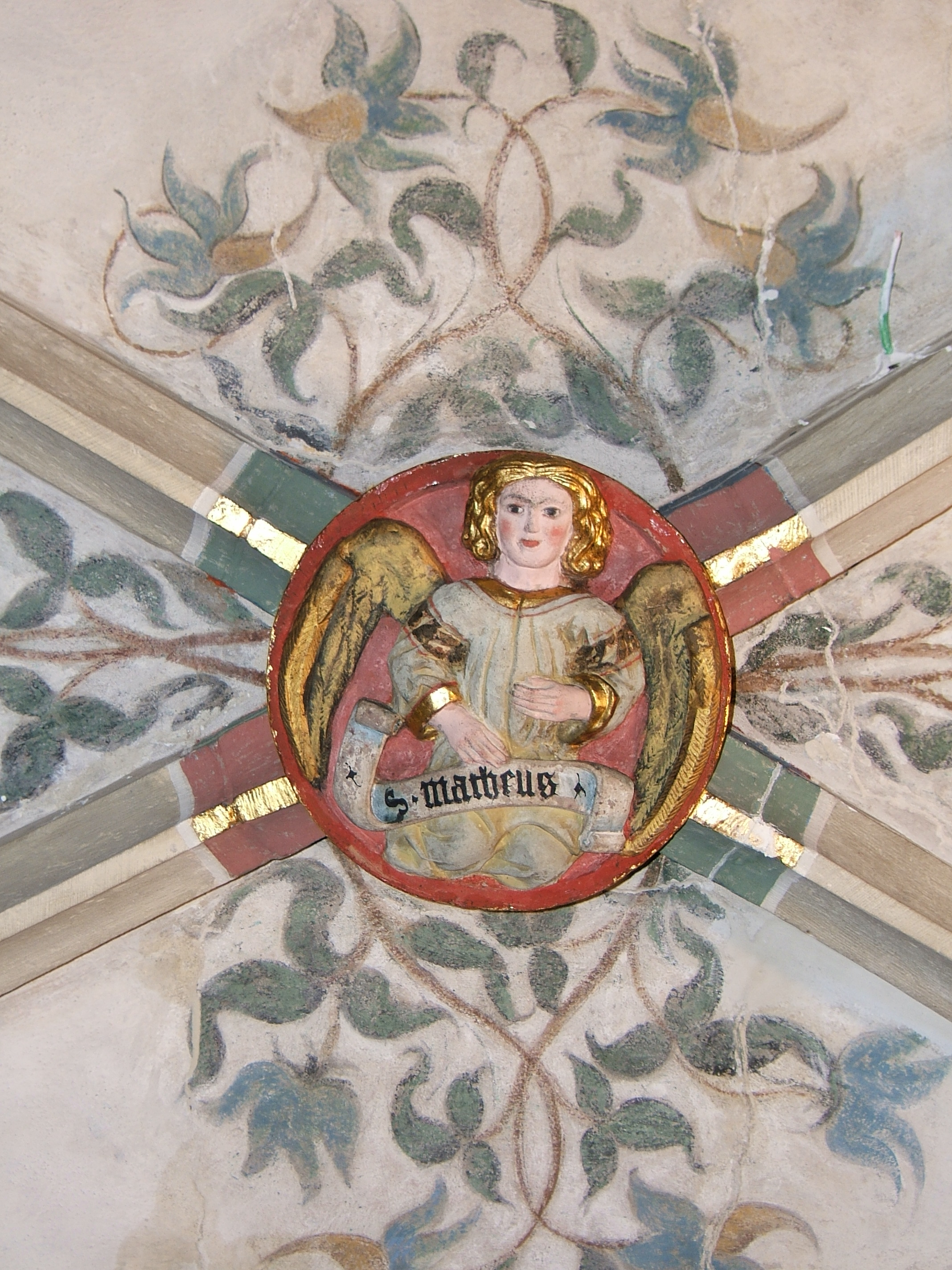 Schlussstein mit dem Symbol des Evangelisten Matthäus im Langhausgewölbe, umgebende Pflanzenmalereien vermutlich 1573